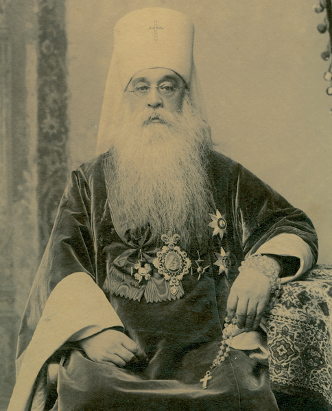 Засновник бібліотеки митрополит Флавіан (1840—1915), фотопортрет